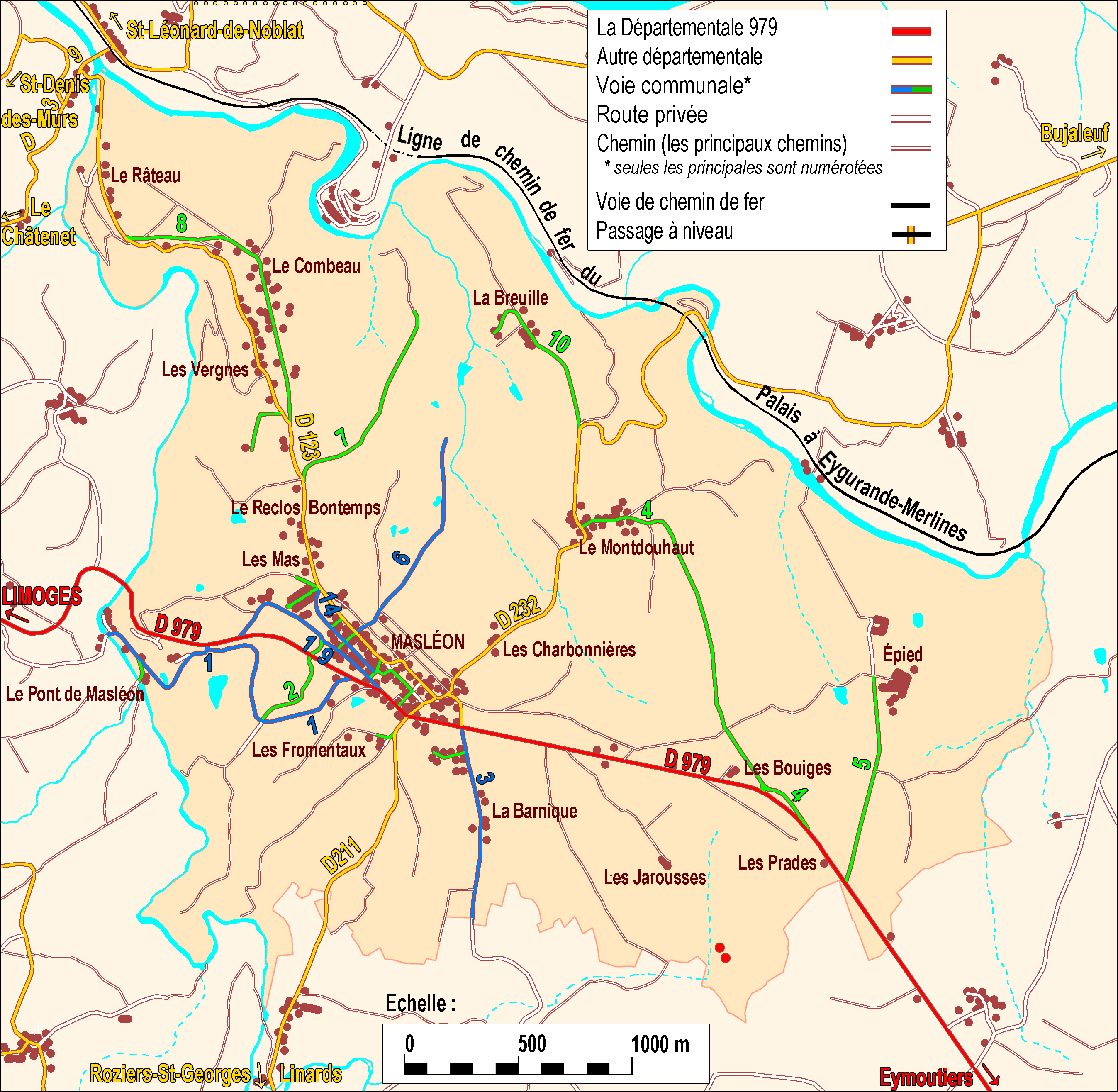 Les routes départementale, les voies communales et la voie de chemin de fer dans Masléon